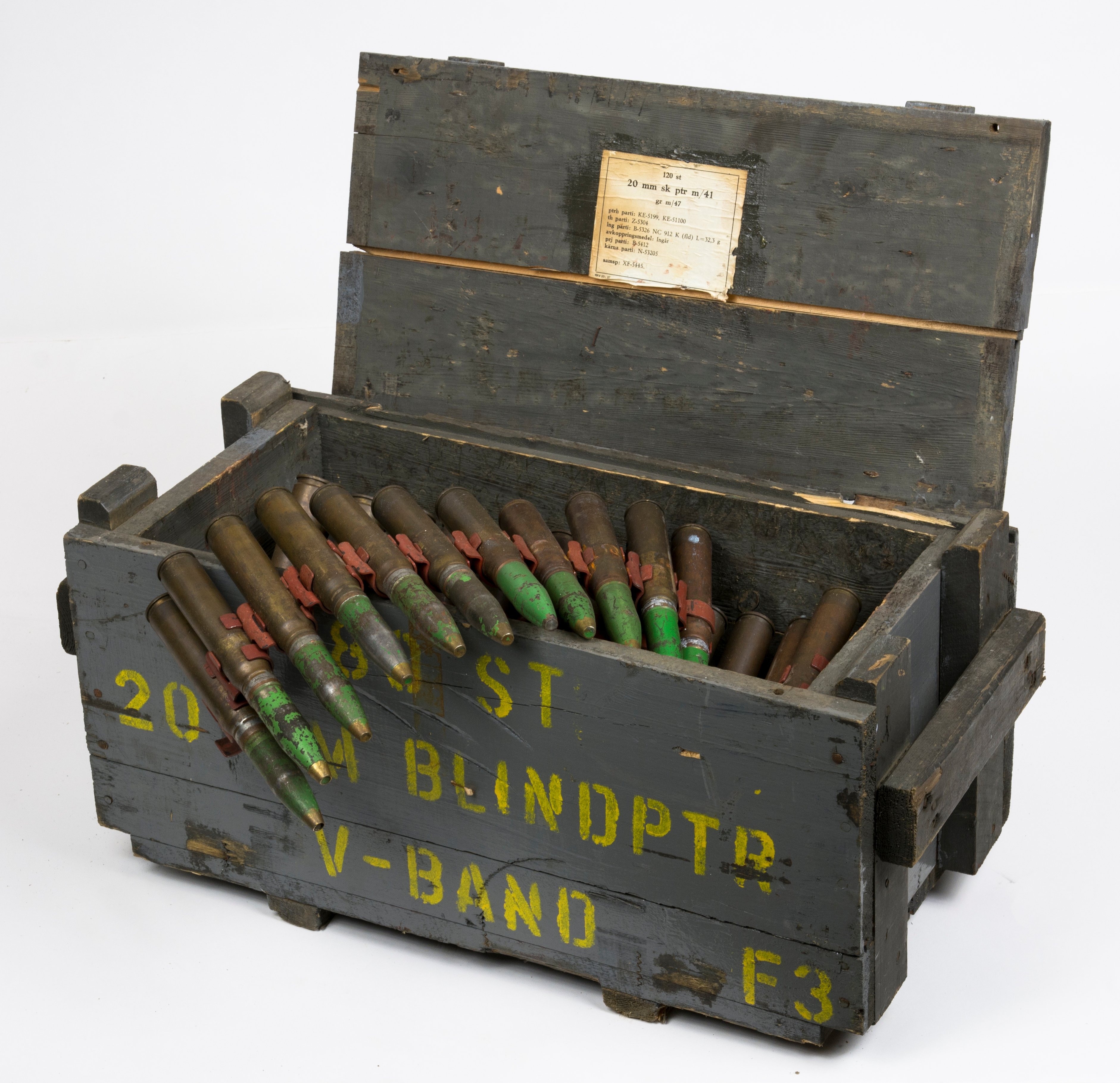 Bild över blind ammunition m41 avsedd för akan m49